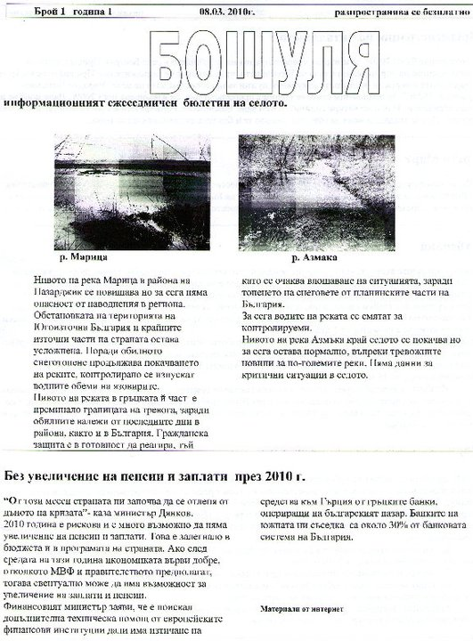 Първия брой на информационния бюлетин "БОШУЛЯ"